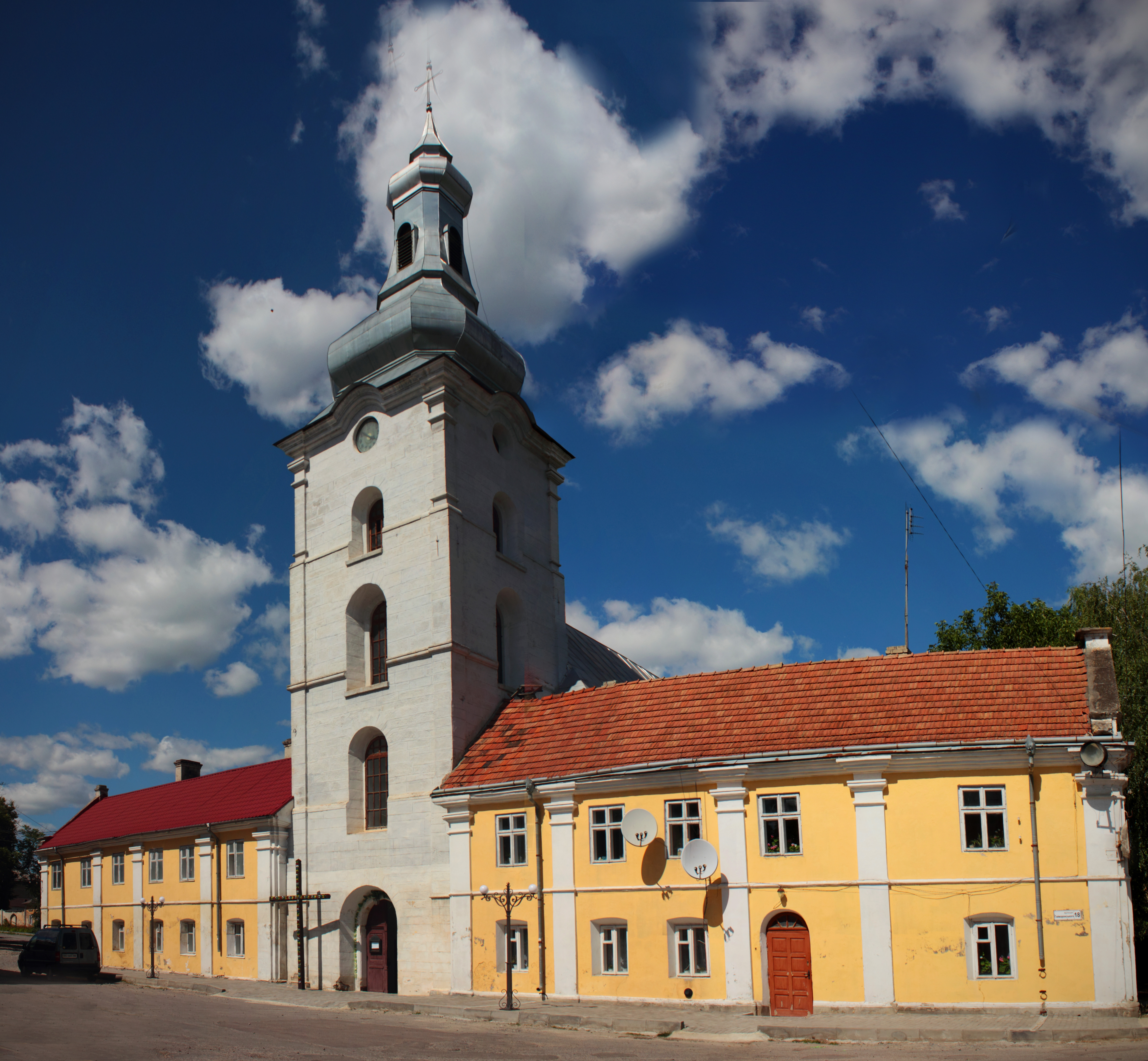 Комплекс костелу св. Станіслава (мур.), Заліщики, вул. Гайворонська, 18